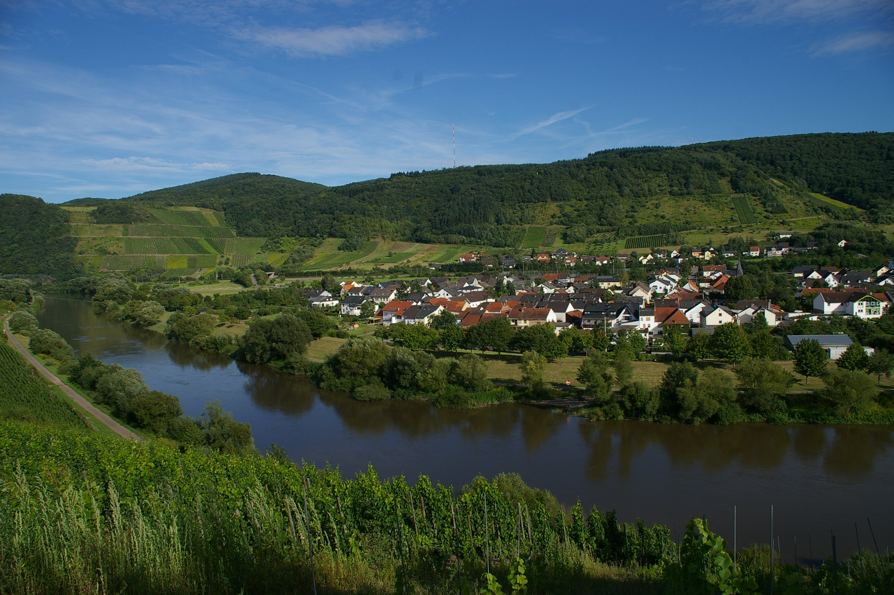 Altarm der Saar bei Schoden